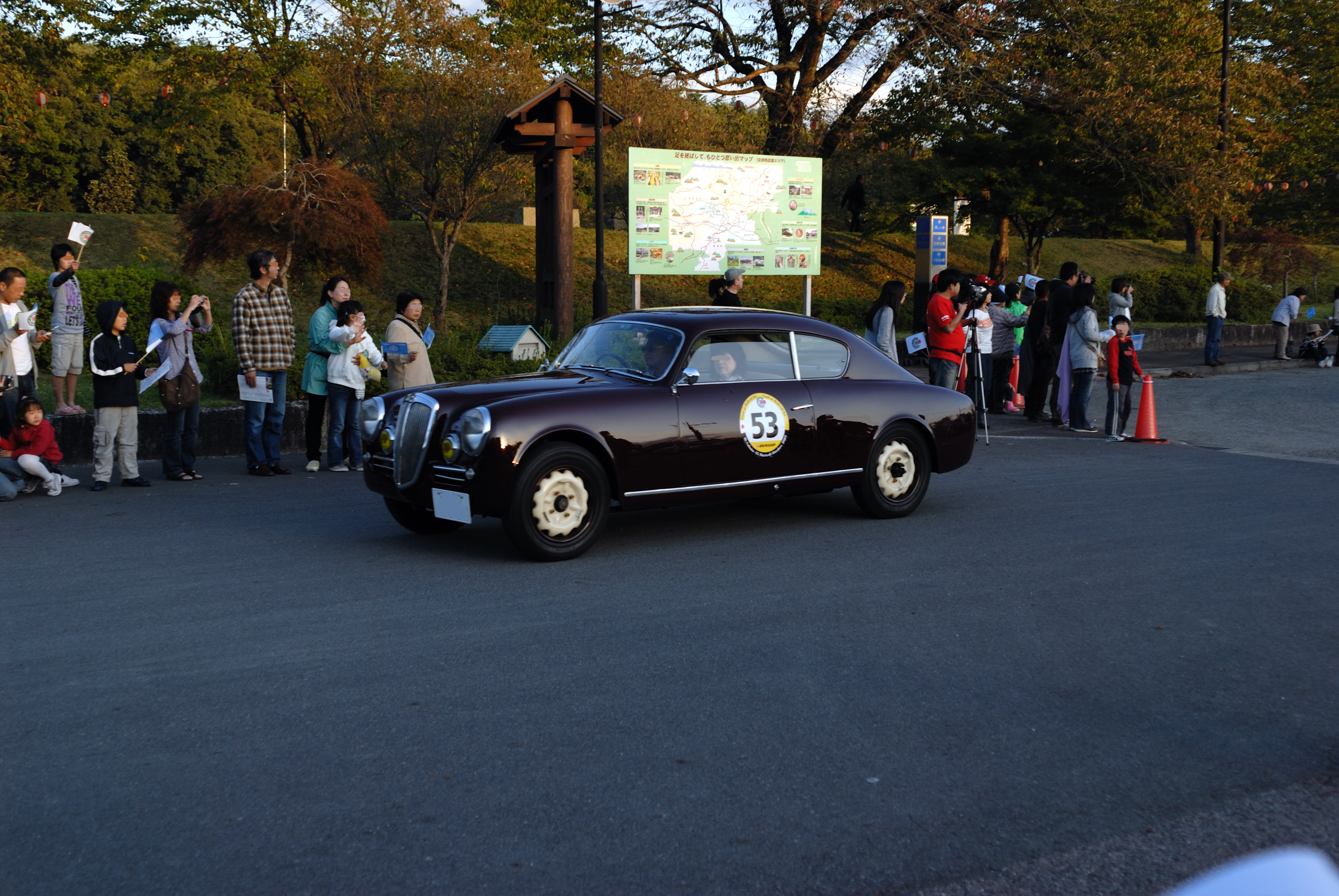 LANCIA AURELIA B20(1953)